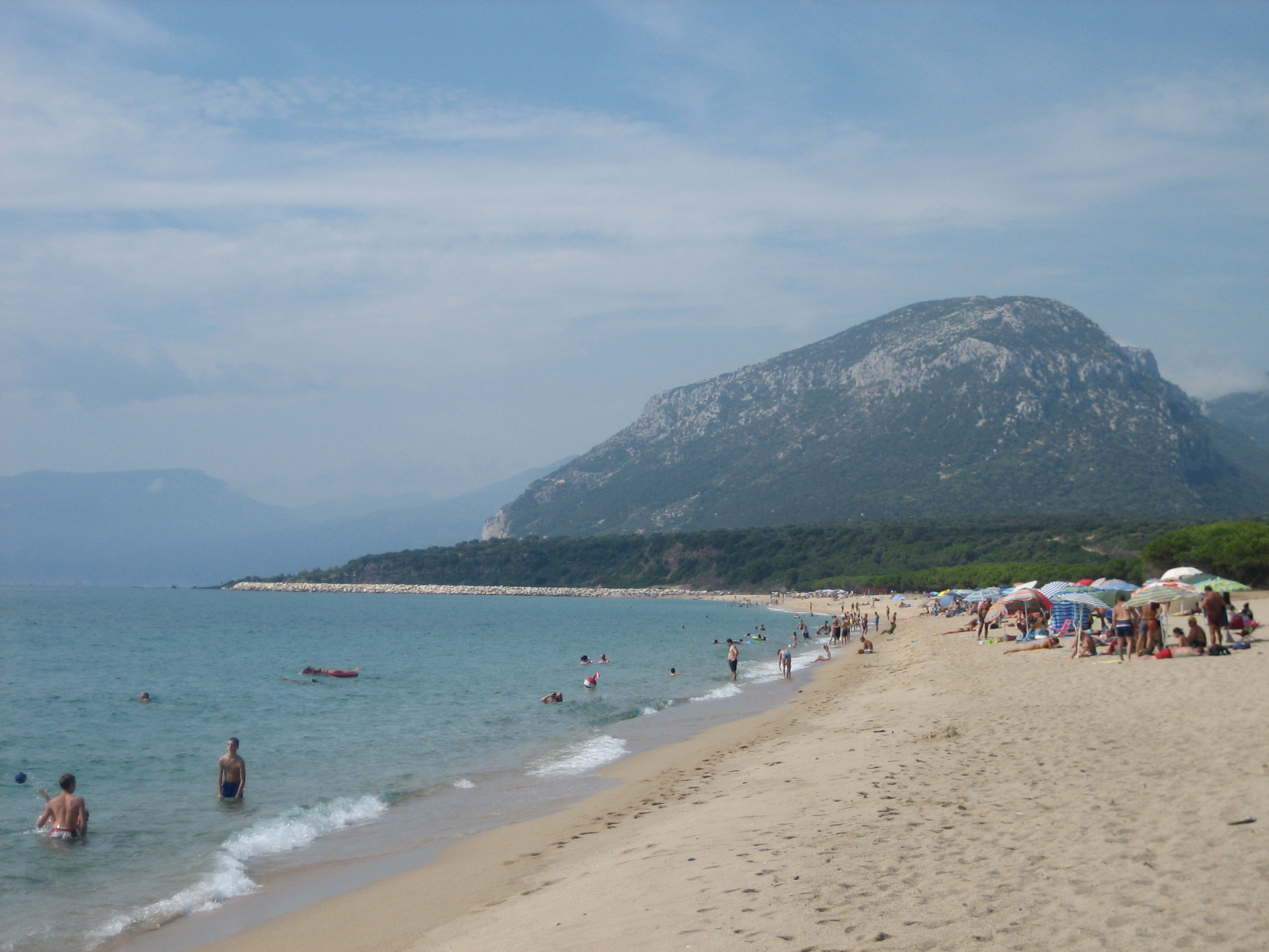 Osala, Orosei (Nuoro, Sardegna)